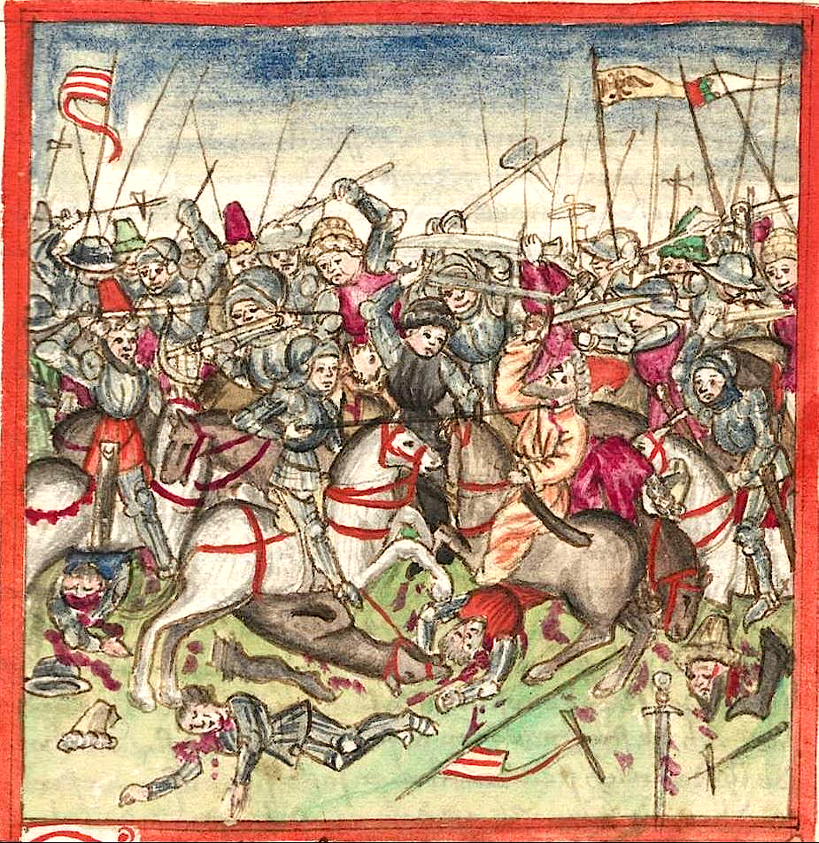 Az augsburgi csata Hektor Mülich 1457-es könyvillusztrációján, amelyet Sigmund Meisterlin Nürnberg város történetét leíró munkájához készített.